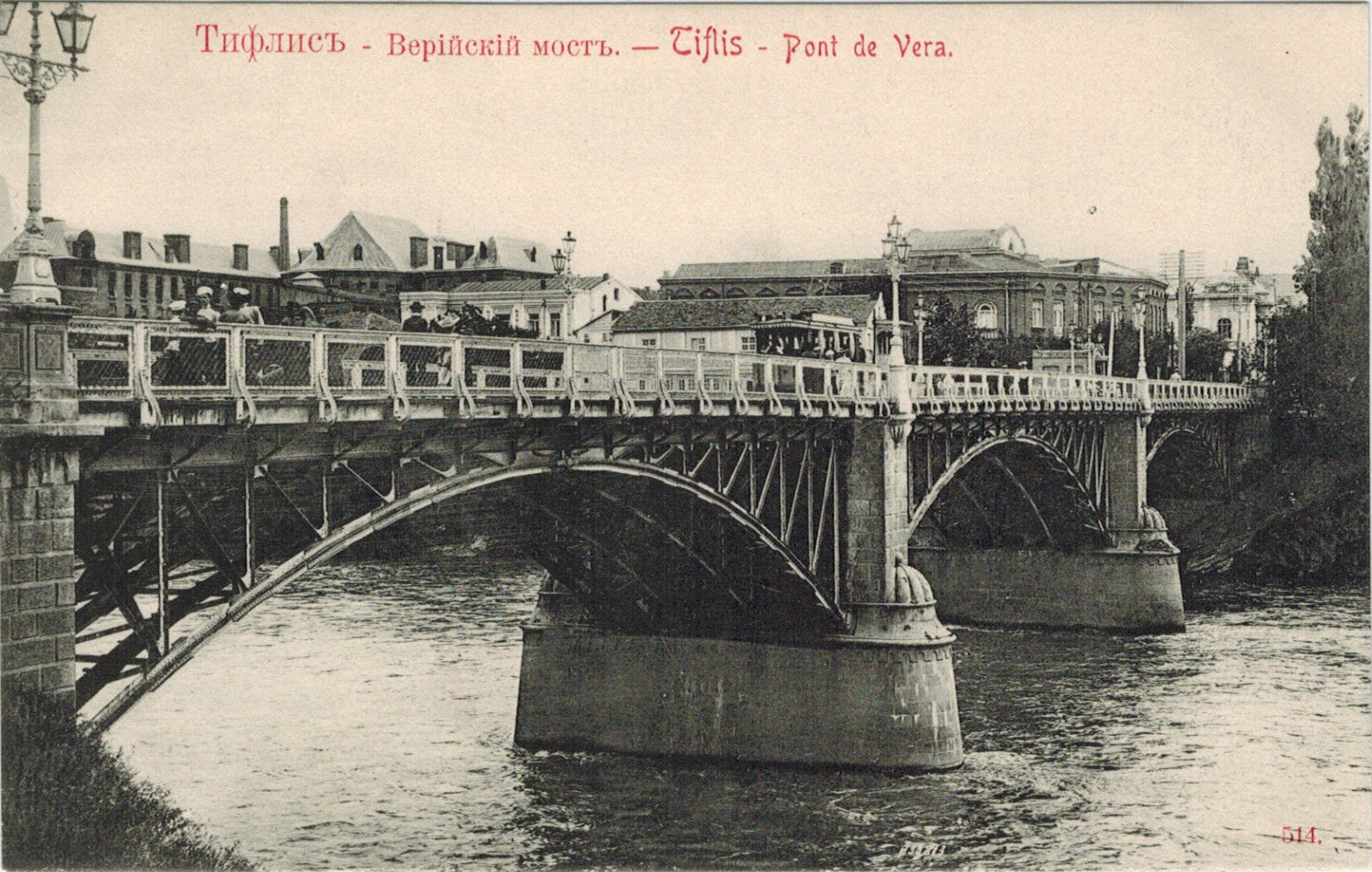 Верийский мост через Куру в Тифлисе.